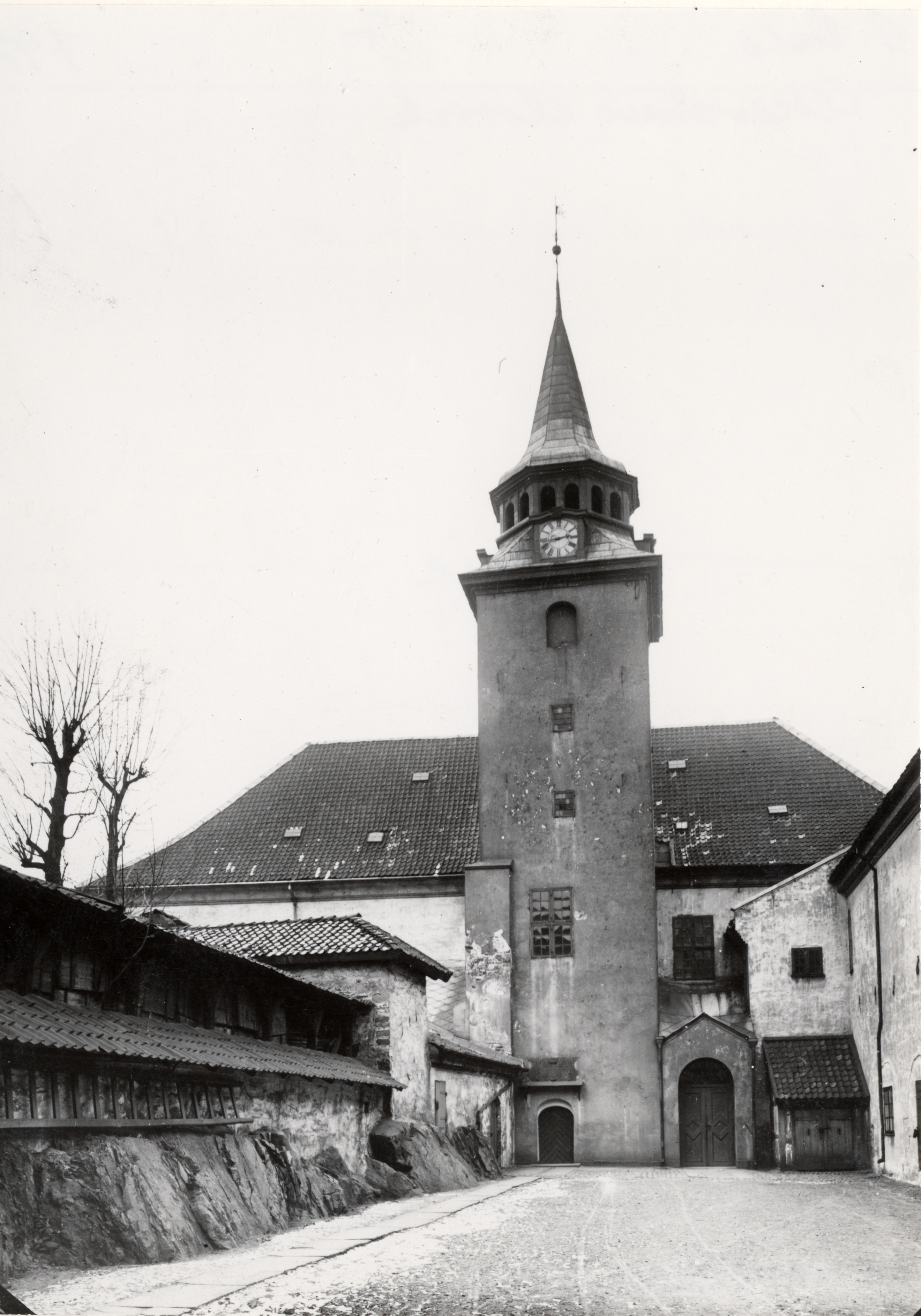 Akershus slottskirke, Akershus Garnisonskirke i Oslo, Oslo